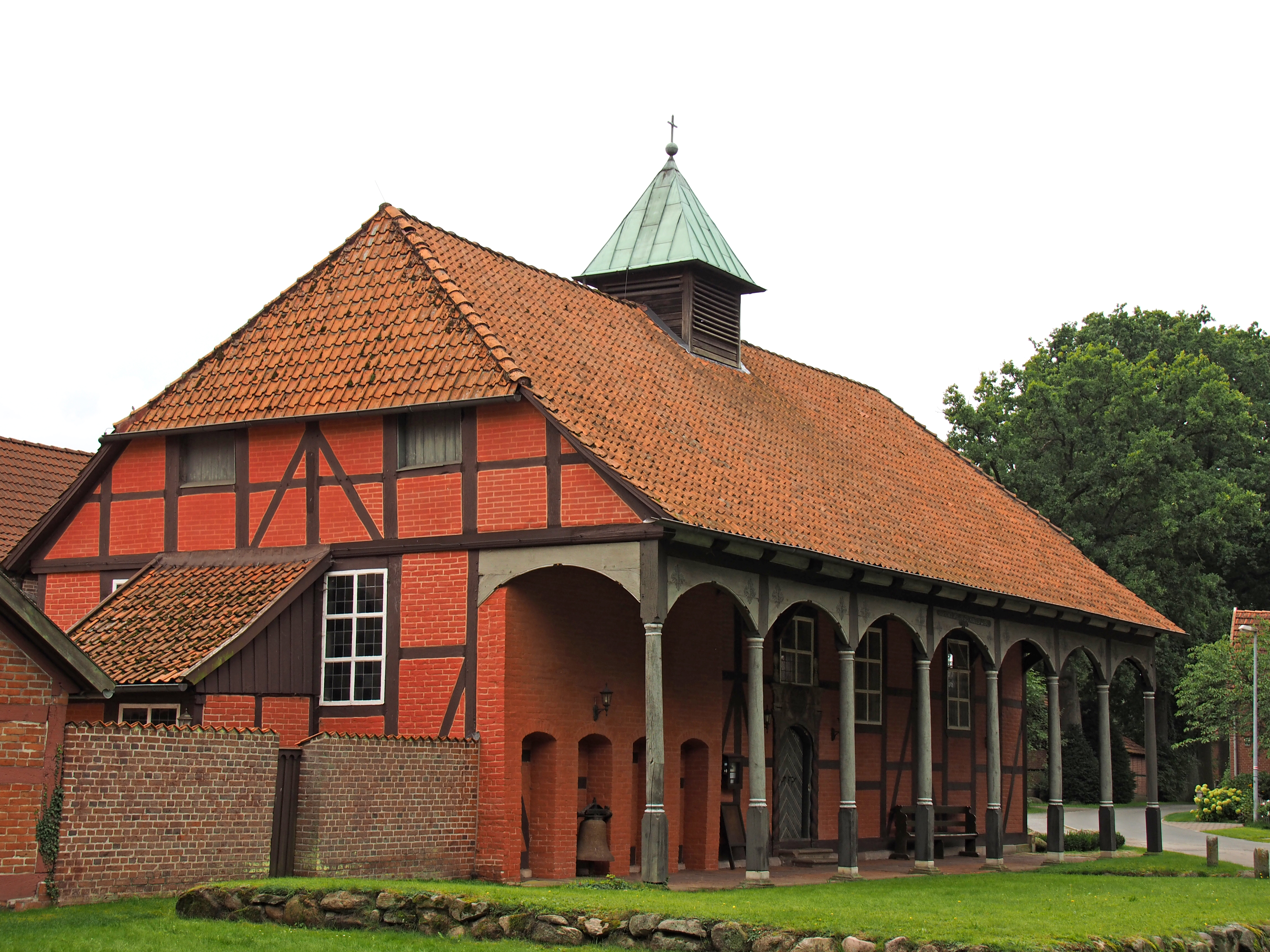 Stechinelli-Kapelle in Wieckenberg, Gemeinde Wietze (Niedersachsen))